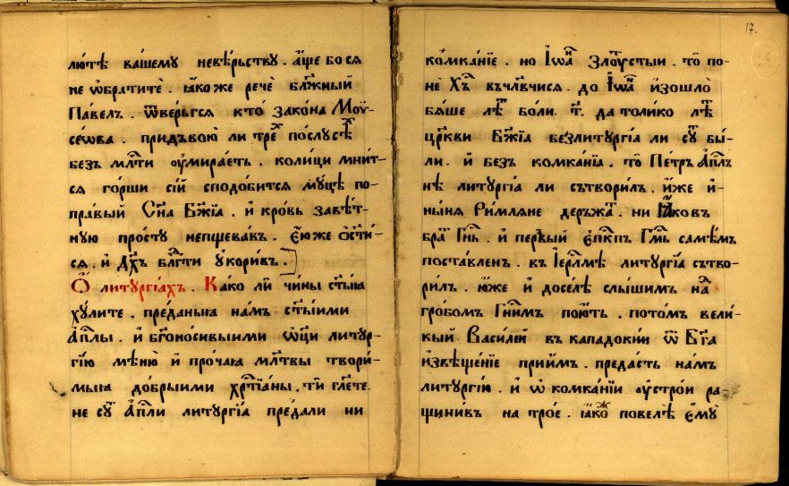 Беседа на јерес богумилу, Sermon against bogomils heresy